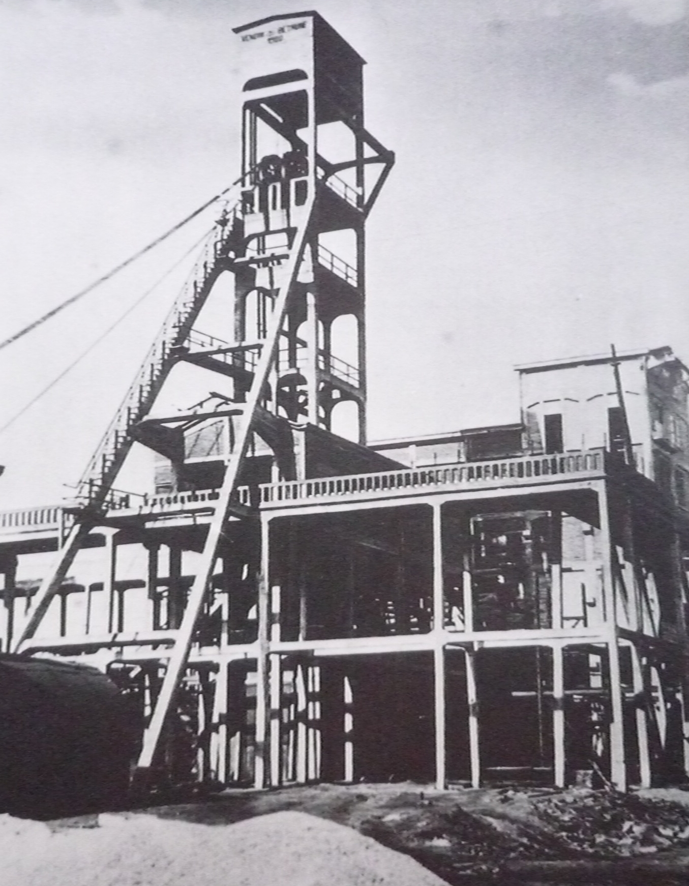 La Fosse n° 1 - 1 bis de la Compagnie des Charbonnages de Vendin-lez-Béthune était un charbonnage constitué de deux puits situé à Vendin-lès-Béthune, Pas-de-Calais, Nord-Pas-de-Calais, France.